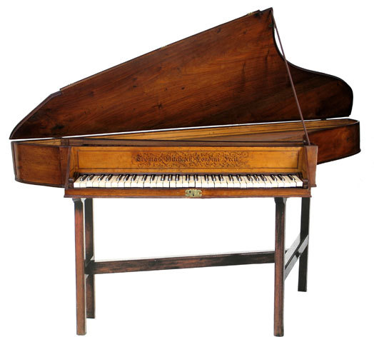 اسپینت